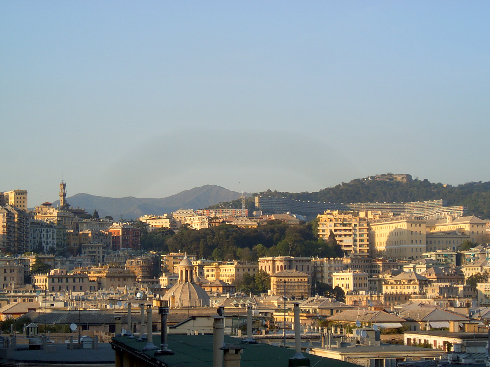 Panorama di Genova da via degli Archi